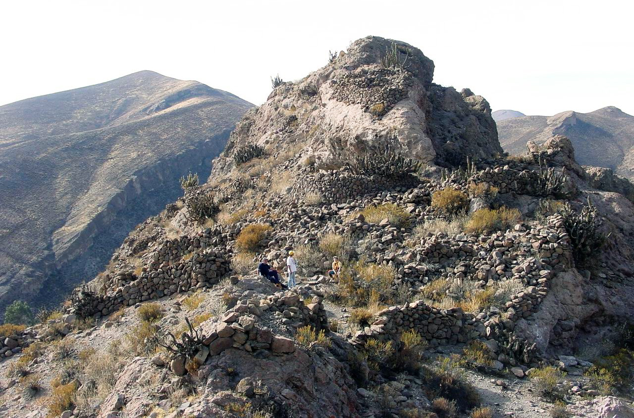 Pucará de Belén o Huaihuarani e Incahullo This is a photo of a national monument in Chile: 260